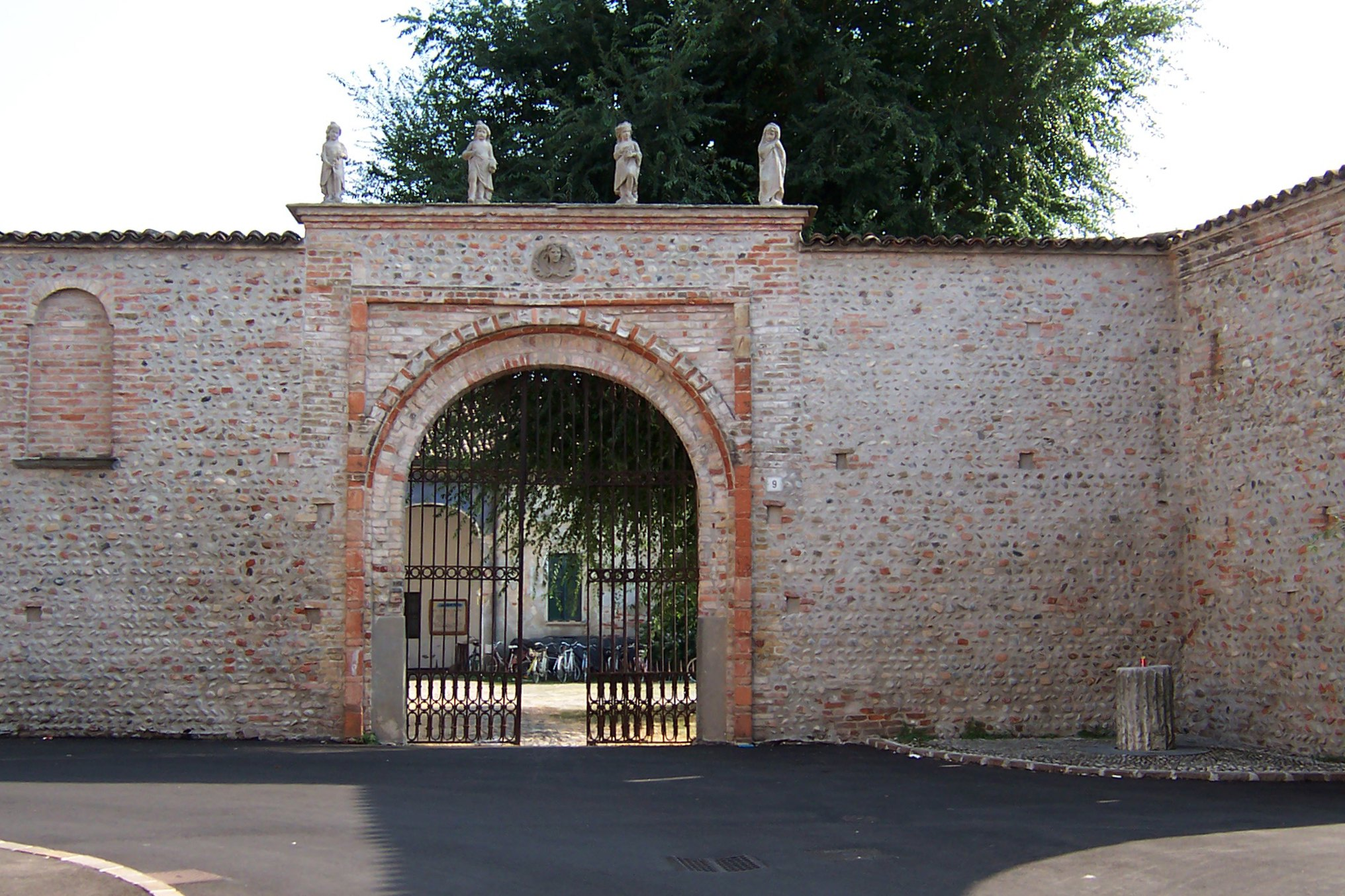 Arzago d'Adda - Portale castello e colonna podestarile, Epoca di costruzione: seconda metà sec. XVI - sec. XVII